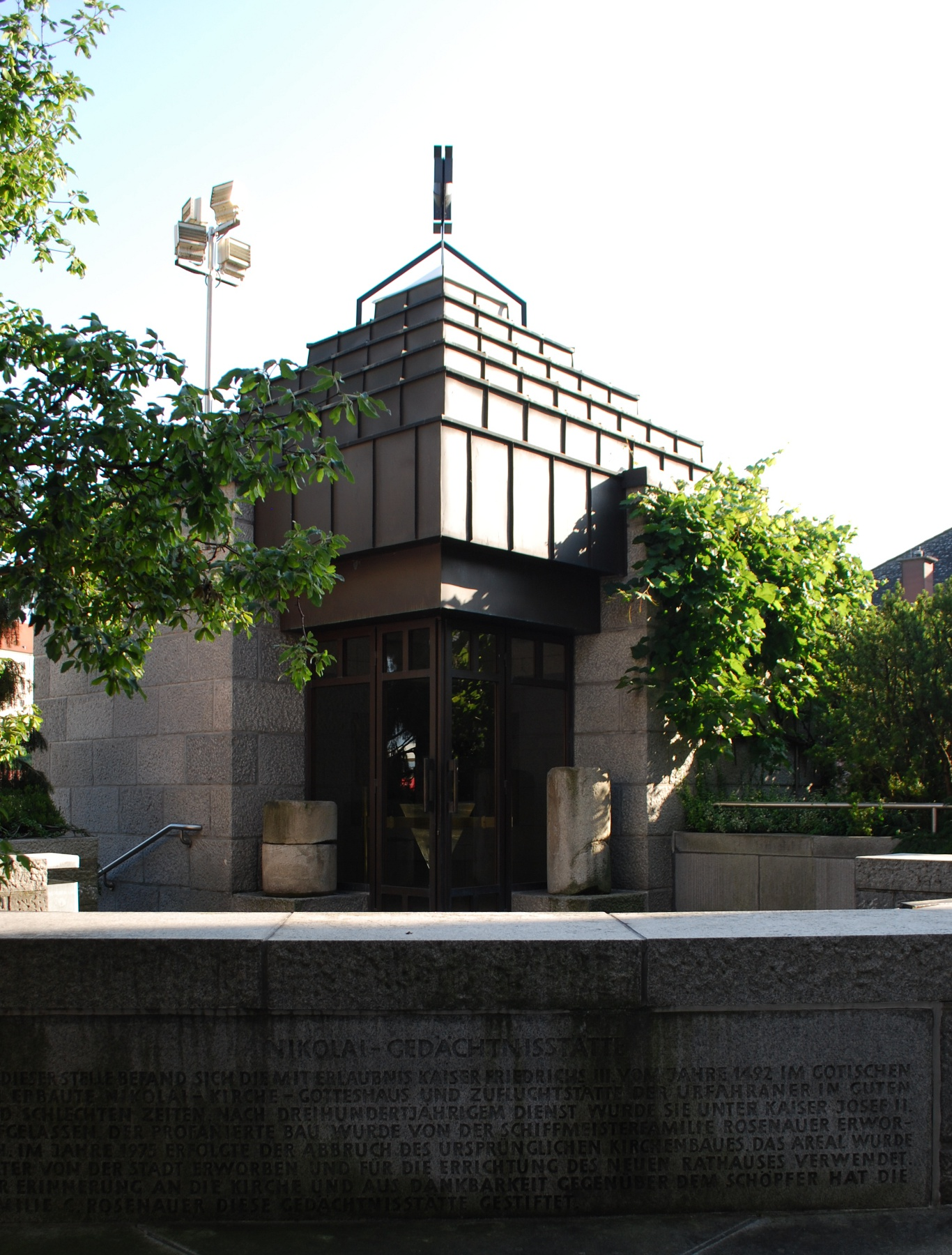 Nikolaikapelle, beim Neuen Rathaus in Linz